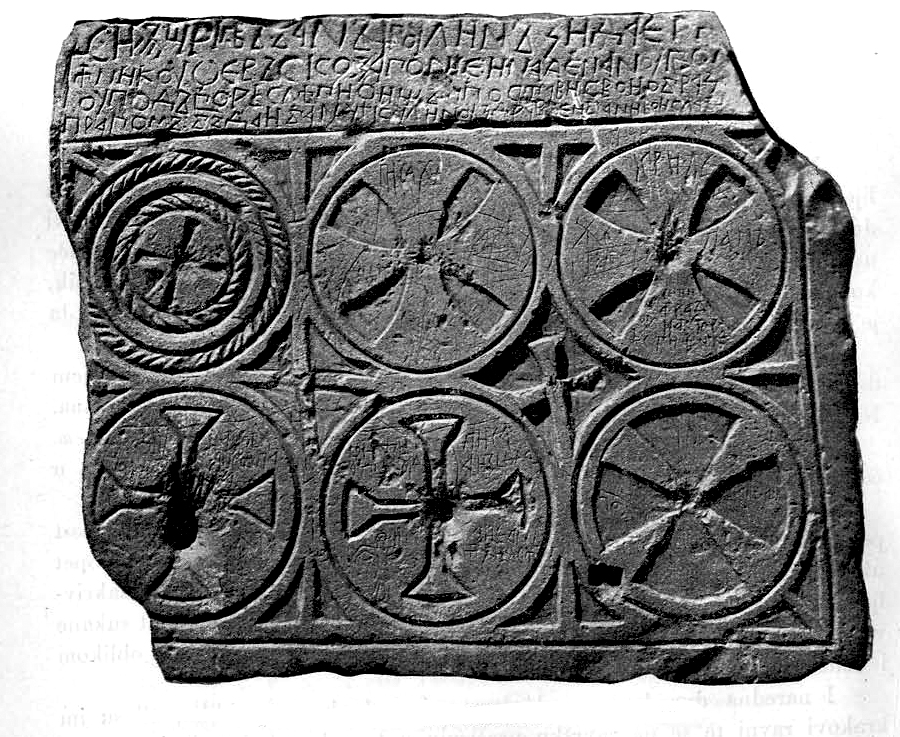 Ploča Kulina bana